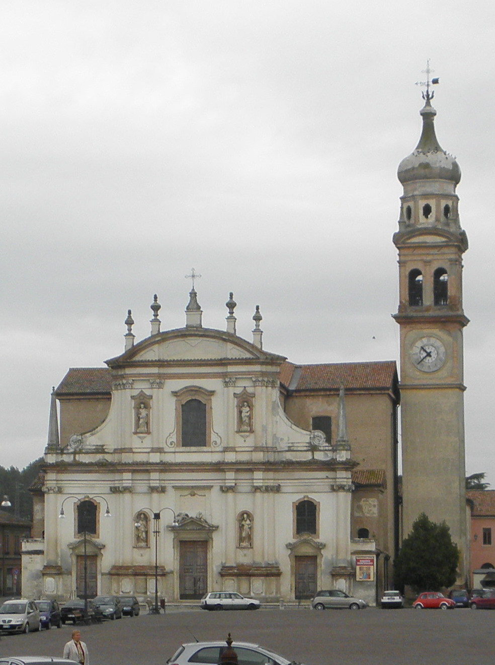 Chiesa parrocchiale dei Santi Martino e Severo, Crespino, provincia di Rovigo.